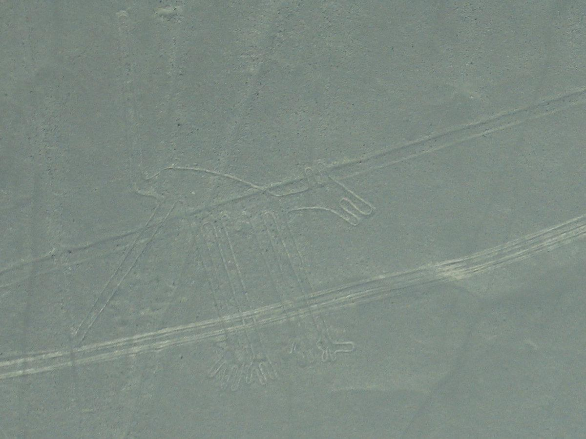 Nasca (Peru), Dog, August 2007